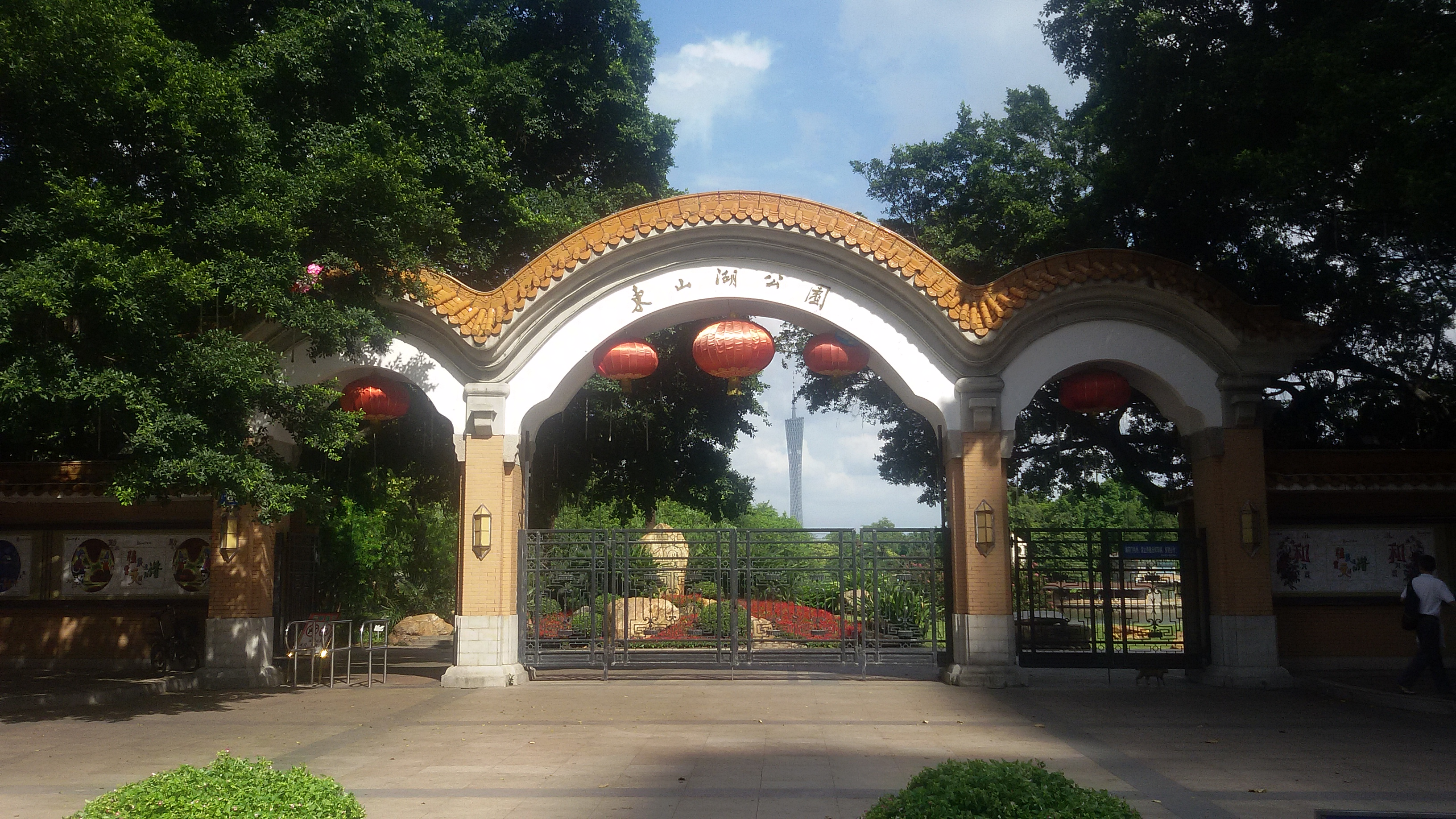 粵語: 東山湖公園嘅正門